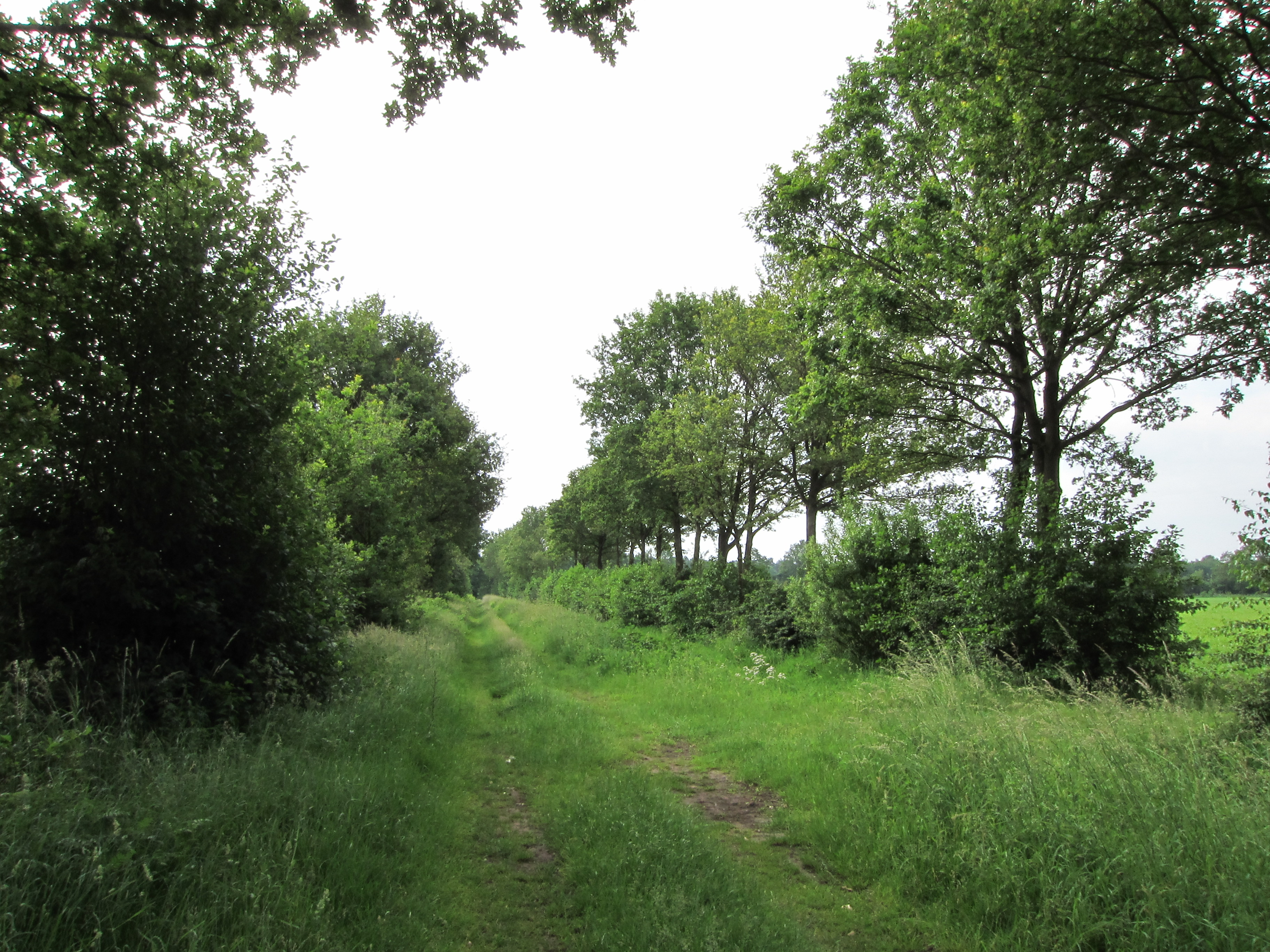 Wiesen und Bäume im Naturschutzgebiet „Trogbahn-Wienhake“ (NSG ST-005) bei Hörstel-Spelle, Blick von Feldkante und Waole